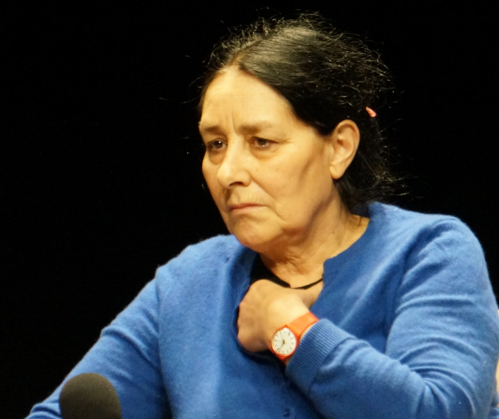 lors de Reims scènes d’Europe 2015.